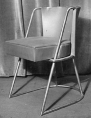 GUILLEMARD Marcel, Chaise en tubulaire en acier nickelé, ( TERRIER, Max, Art et décoration, meubles métalliques (les sièges), Paris, février 1932,p.46 )